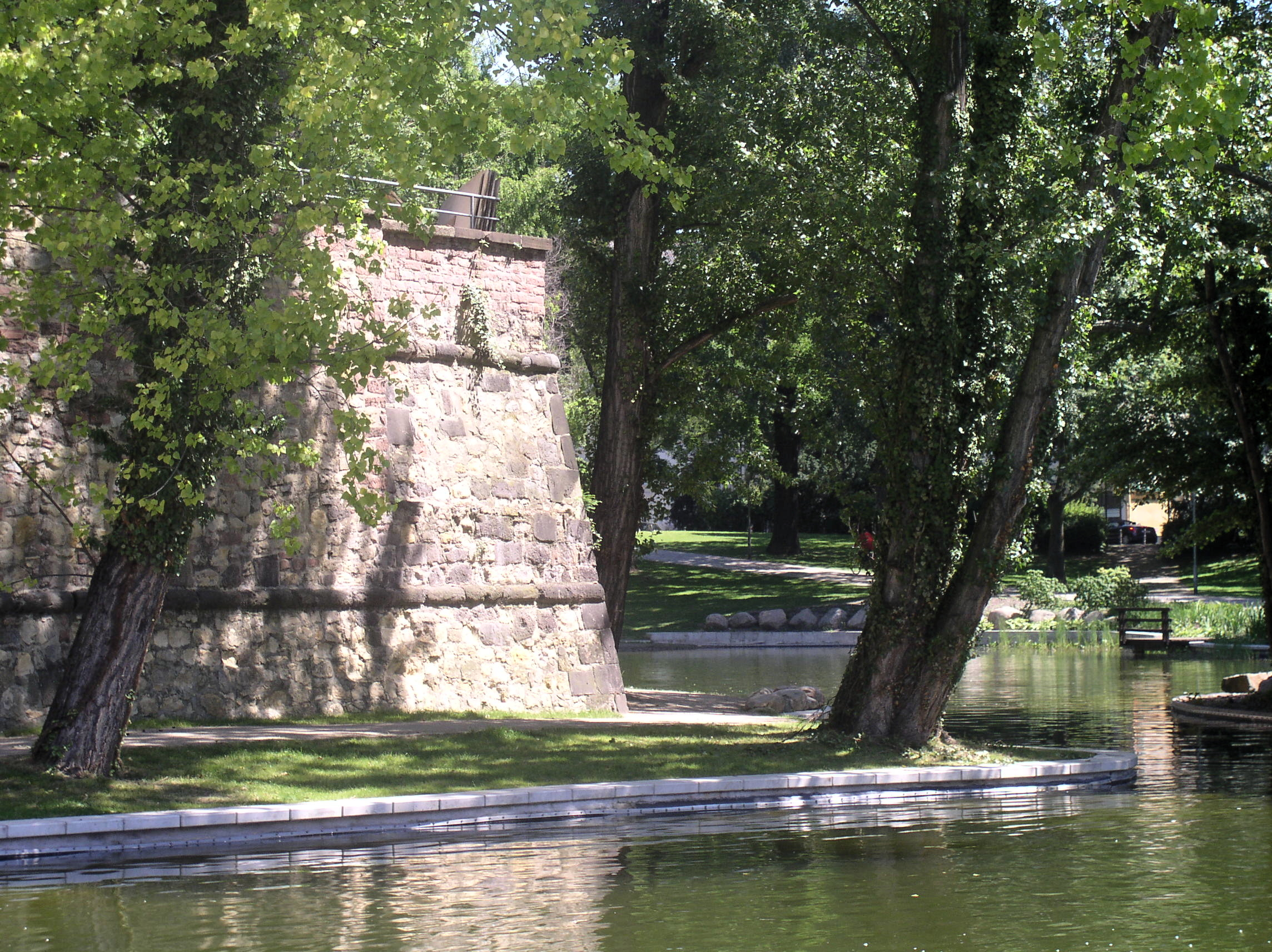 Mauerreste der Frankfurter Stadtbefestigung aus dem 17. Jahrhundert: Reste des Allerheiligen- oder Judenbollwerks (Bastion) in der Obermainanlage, mit Rechneigrabenweiher